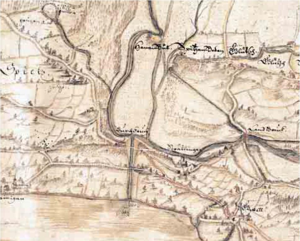 Extrait d'un plan de S. Bodmer relatif à la Déviation de la Kander